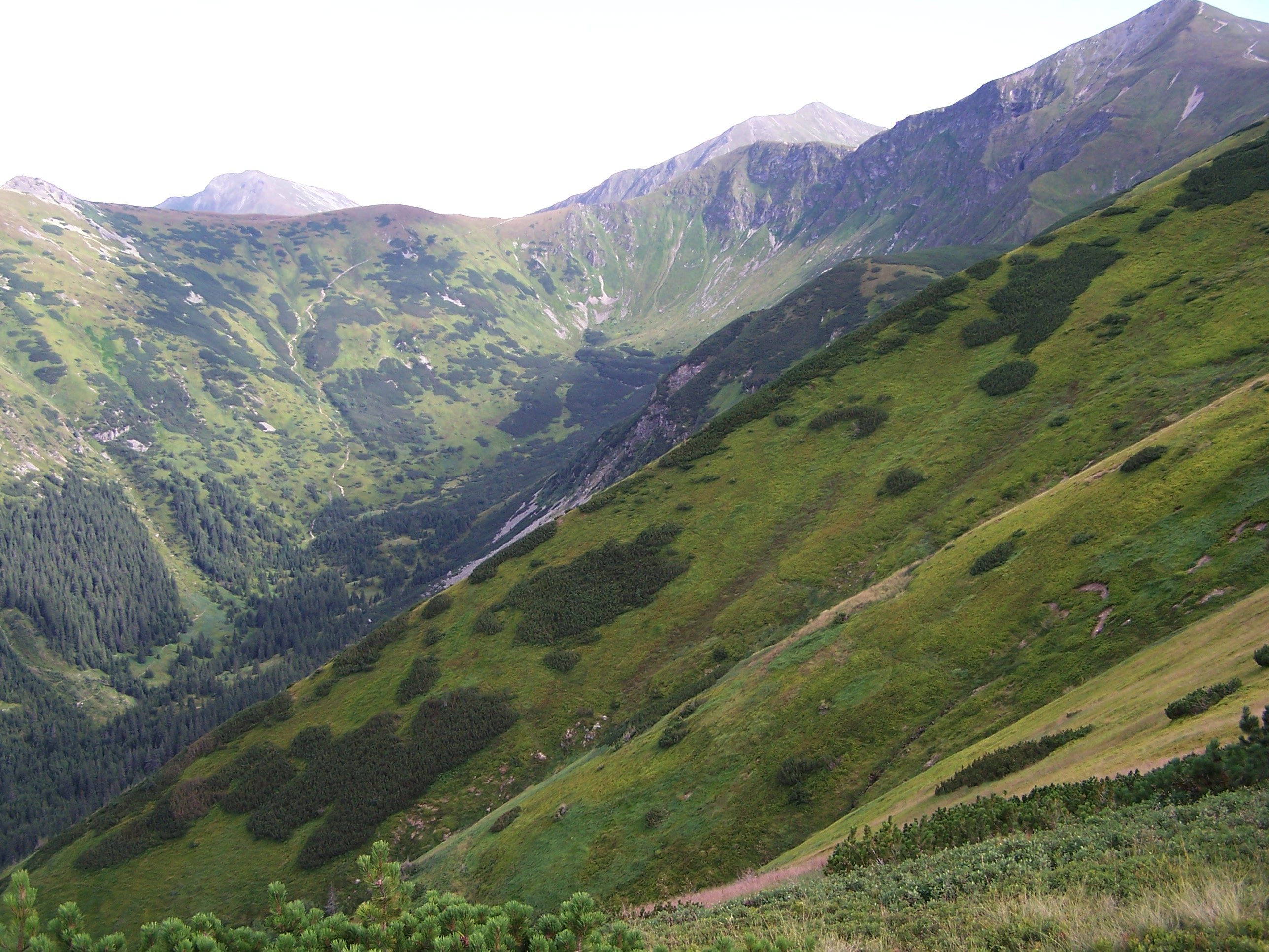 Dolina Starorobociańska (West Tatra Mountains)